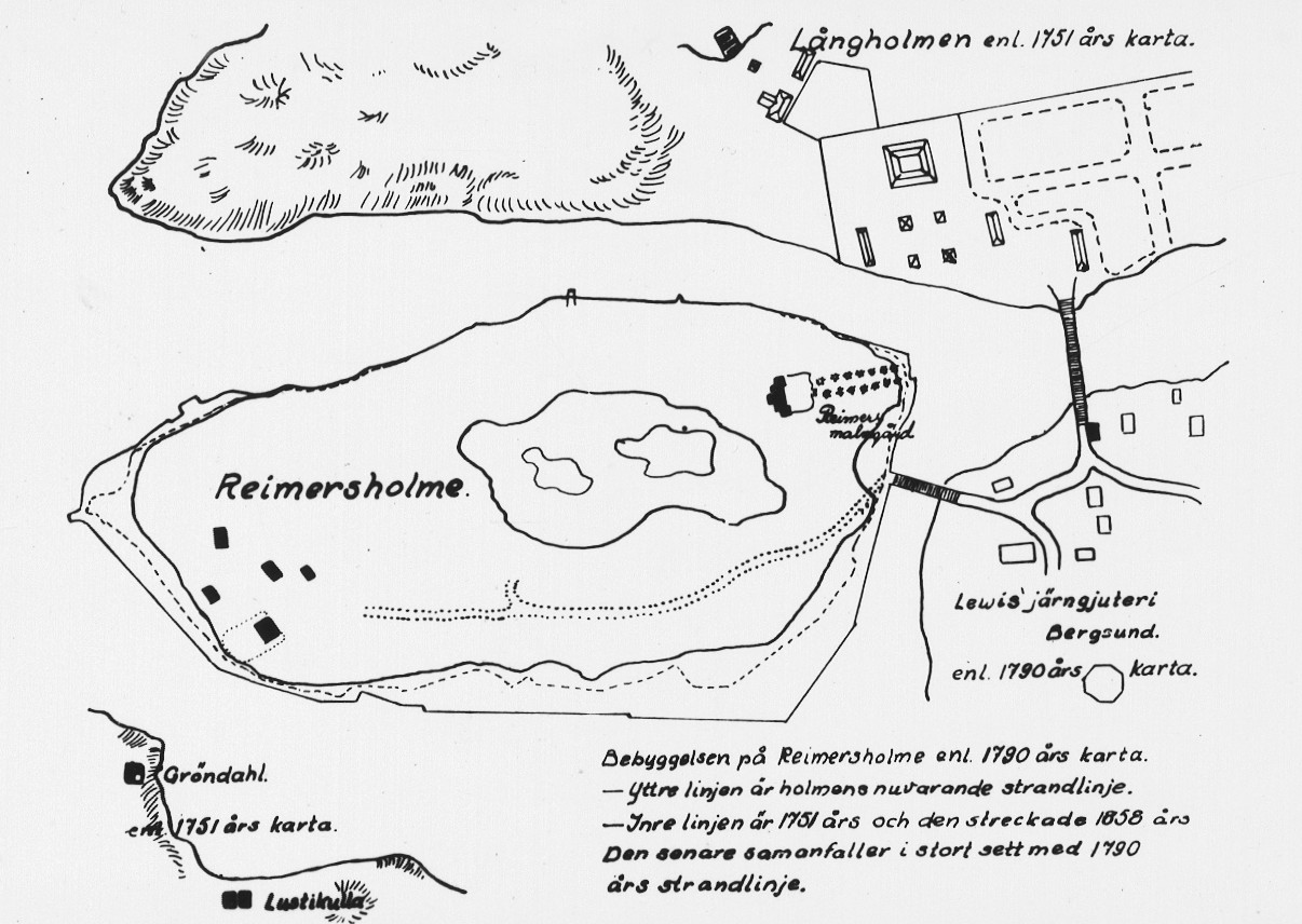 Karta över Reimersholme från 1790